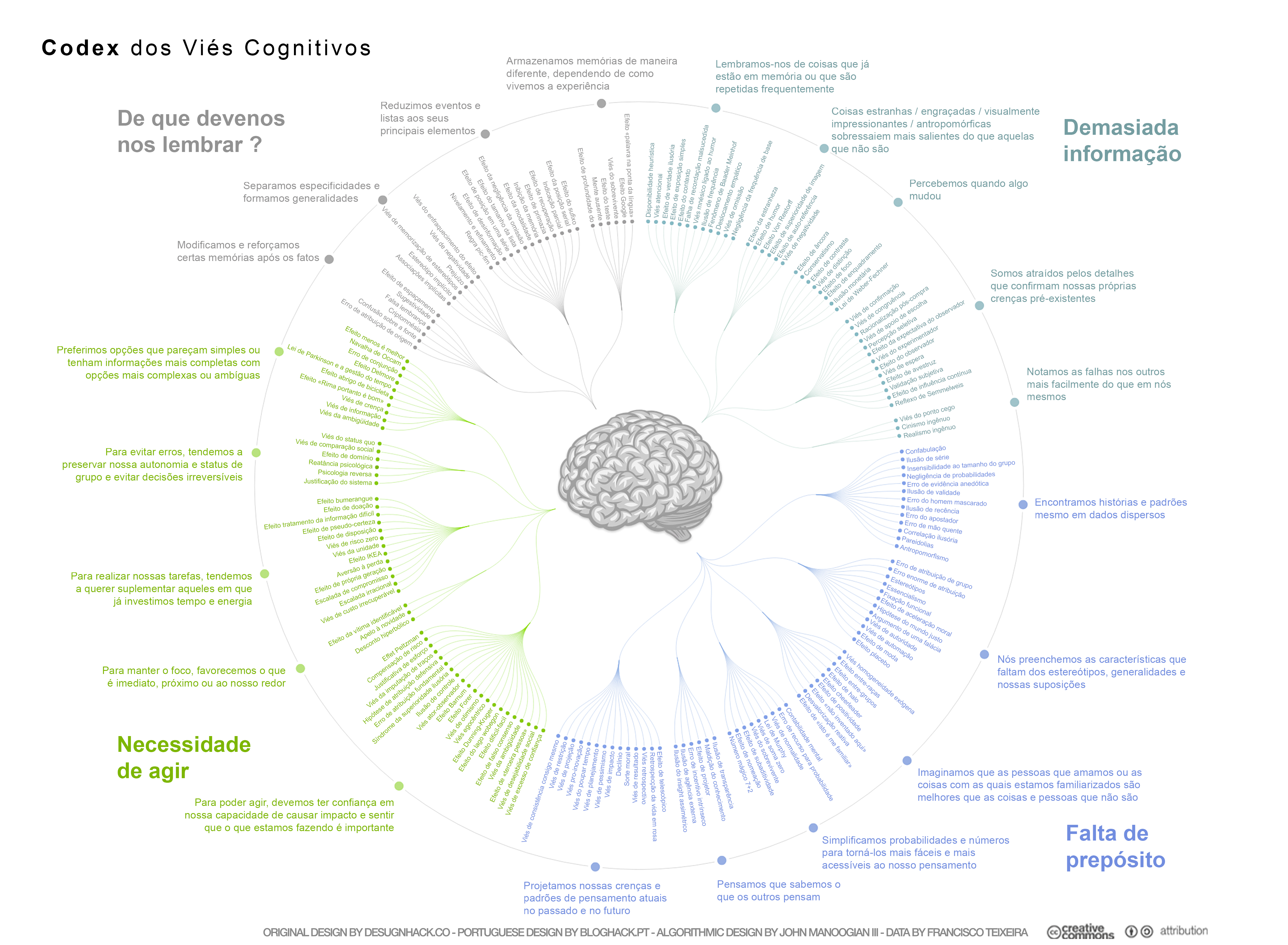 Os vieses cognitivos podem ser organizados em quatro categorias: vieses que resultam de muita informação, significado insuficiente, necessidade de agir rapidamente e limites de memória. Modelo Algoritmico: John Manoogian III (jm3) Modelo Organizacional: Buster Benson.